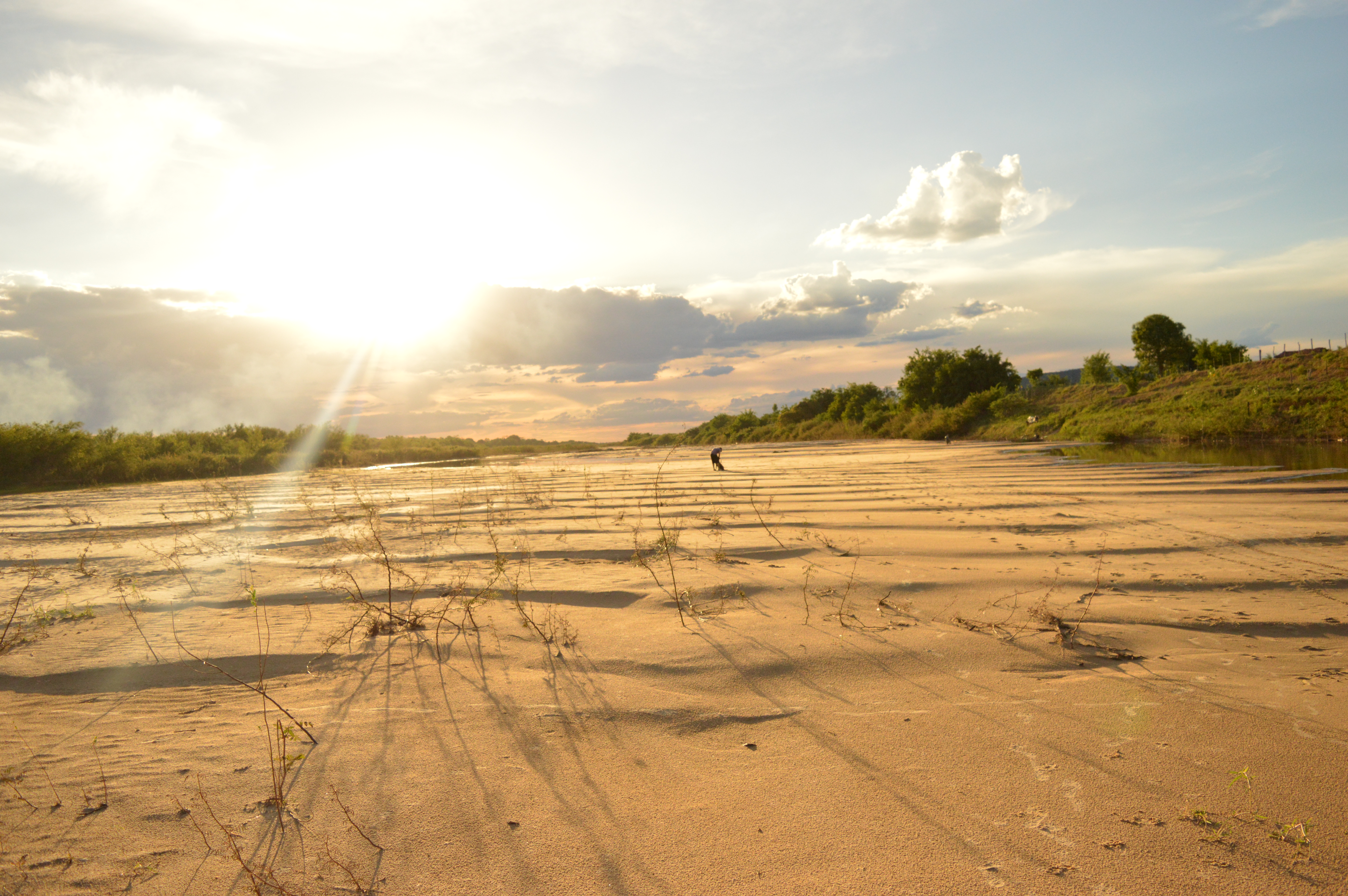 Vista da Ilha de Paratinga durante seca. Foto de 16 de janeiro de 2017.